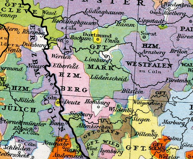 Deutschland im 15. Jahrhundert, Ausschnitt Herzogtum Berg